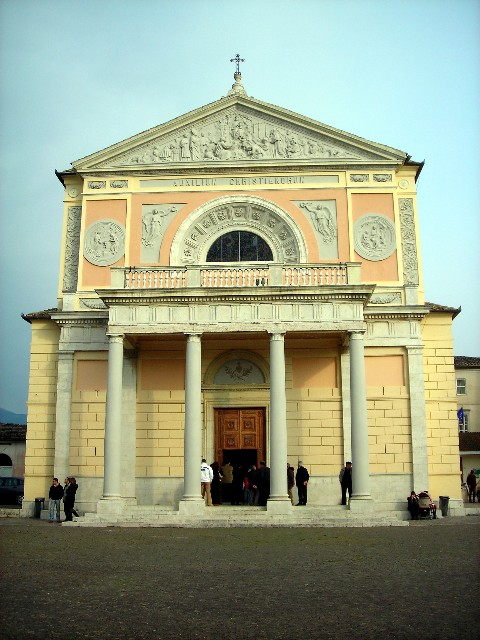 church of Madonna della Stella, Montefalco, Perugia, Umbria, Italy